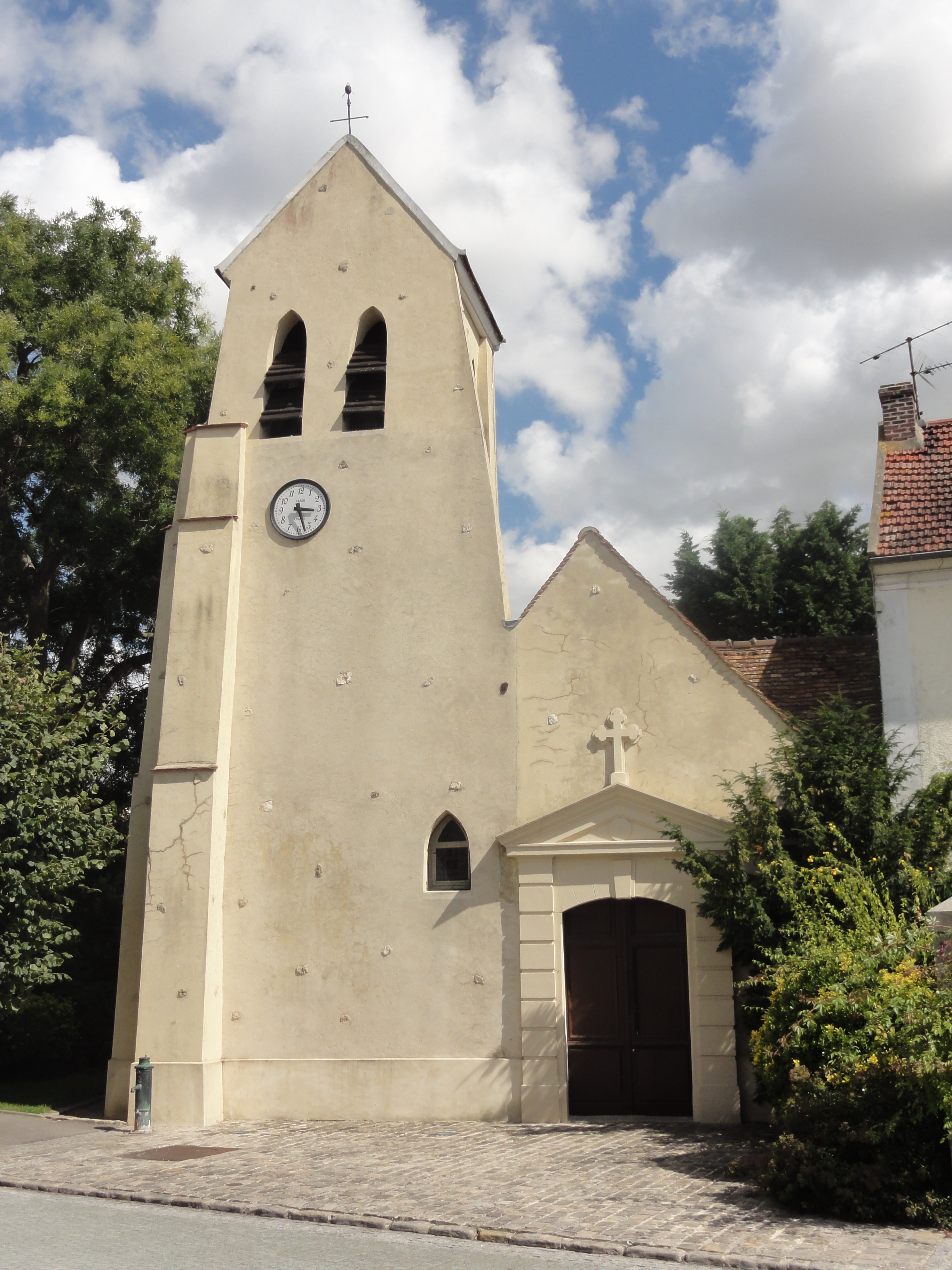 Façade occidentale.